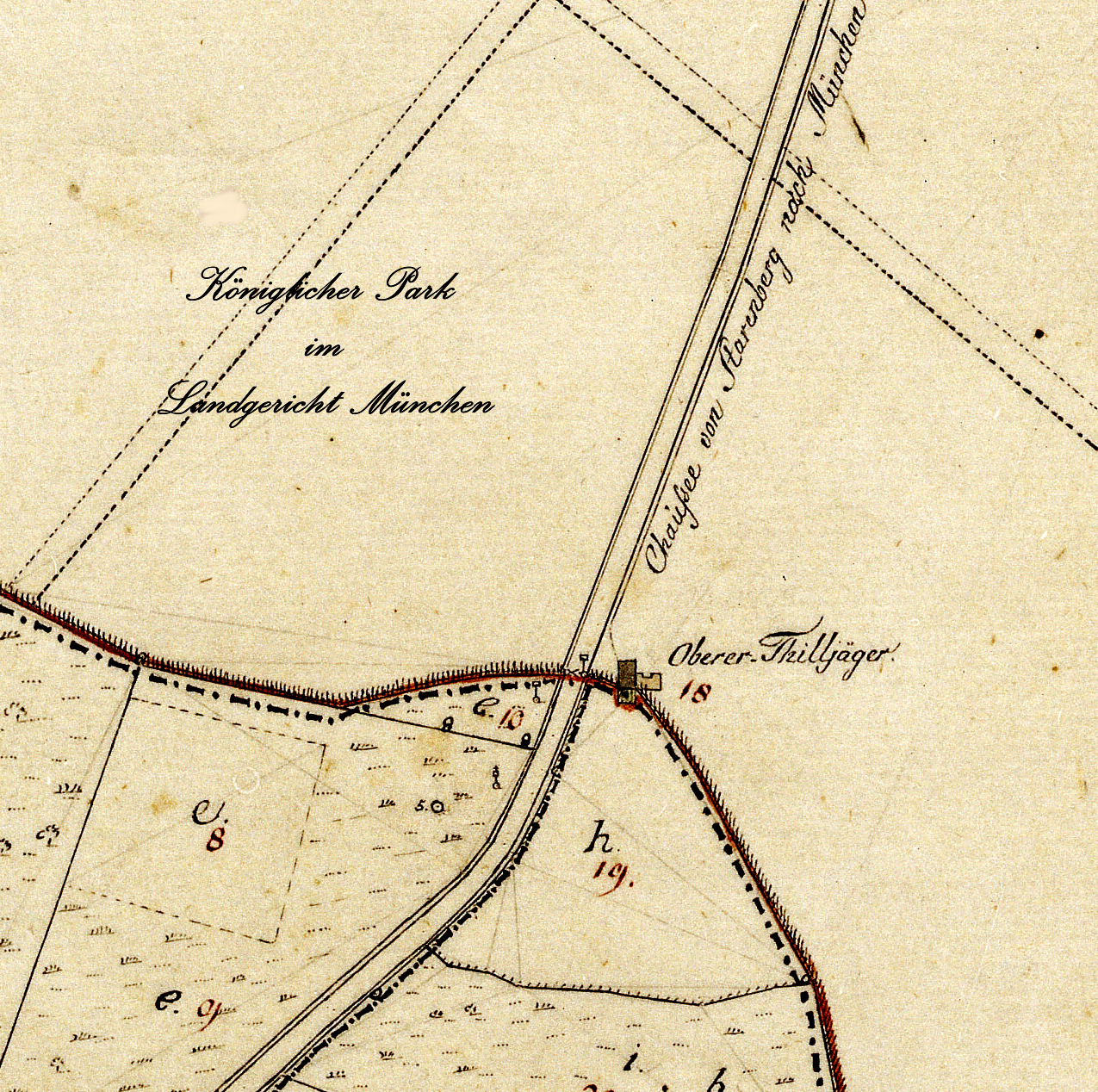 Oberdill 1809. Lage des Anwesens Oberer Thilljäger innerhalb des heutigen Forstenrieder Parks.